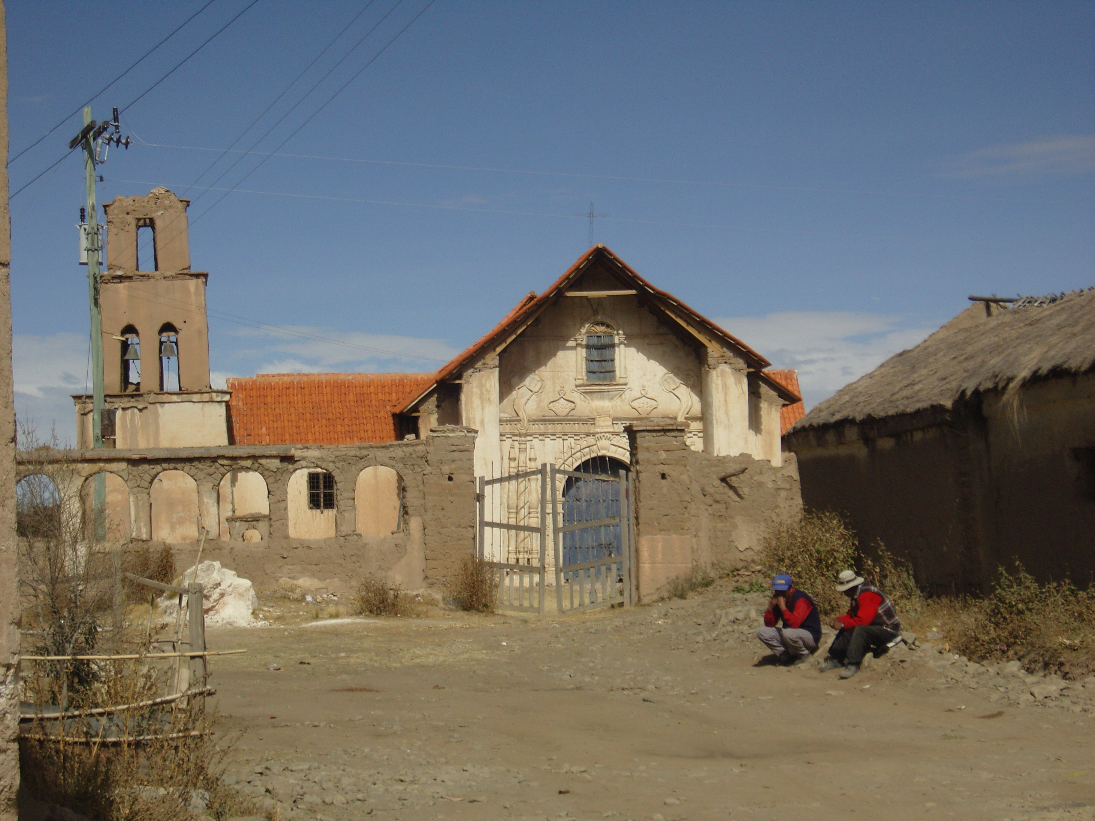 Iglesia de Urmiri, Oruro - Bolivia